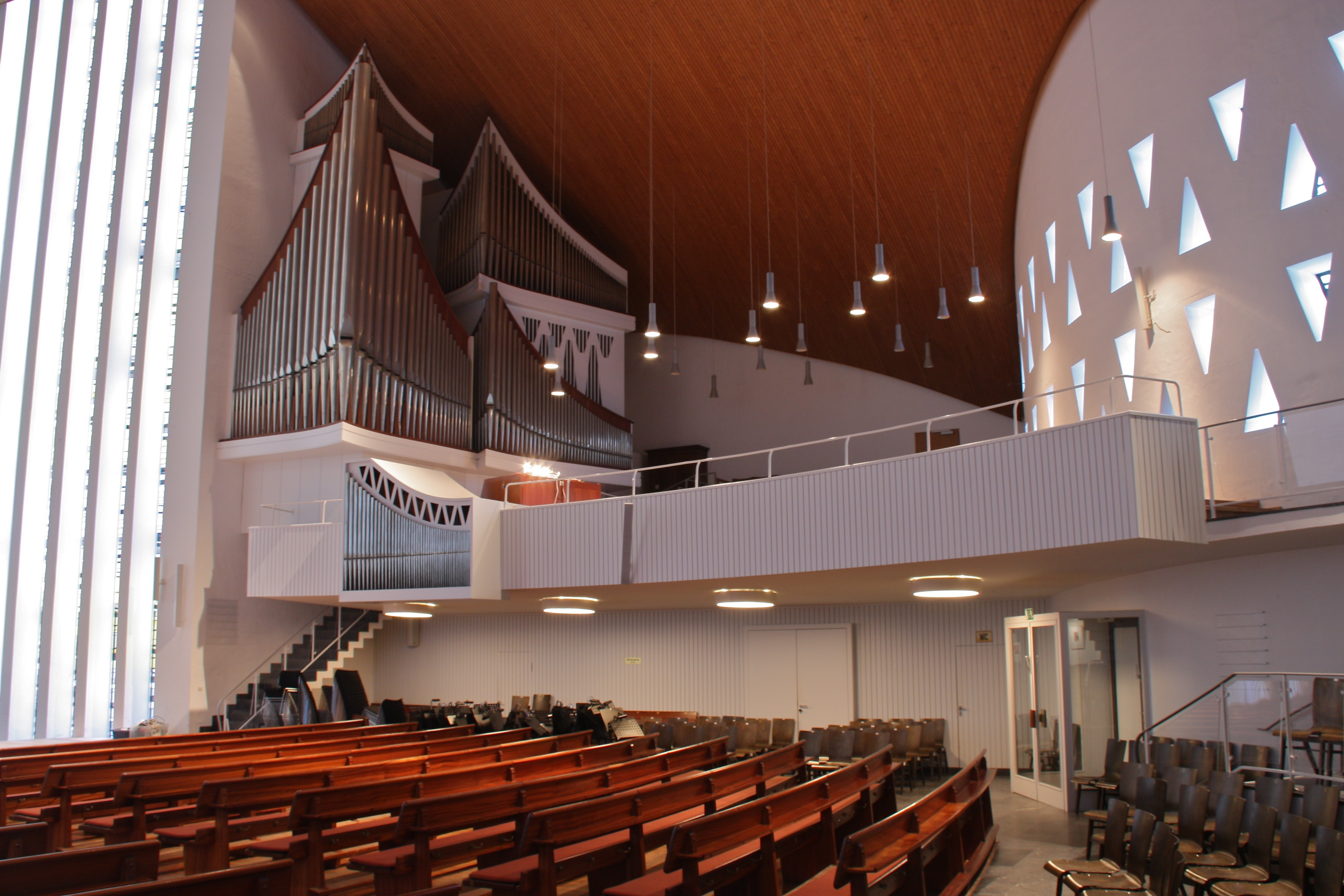 Hamburg, Neue Nikolaikirche Harvestehude, Orgel, Planung Ernst-Karl Rössler, Bau durch die Fa. Willi Peter